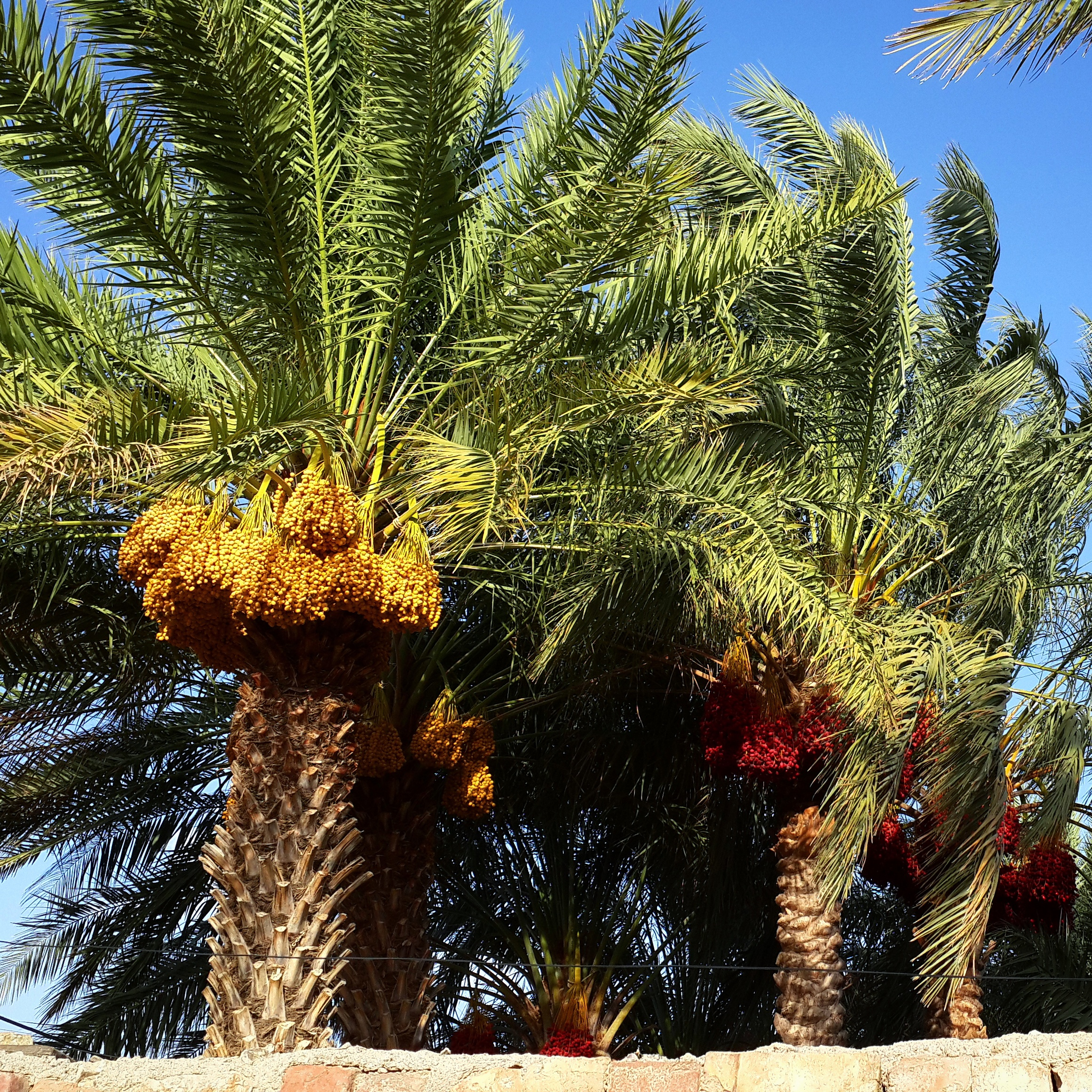 هامین در لاشار